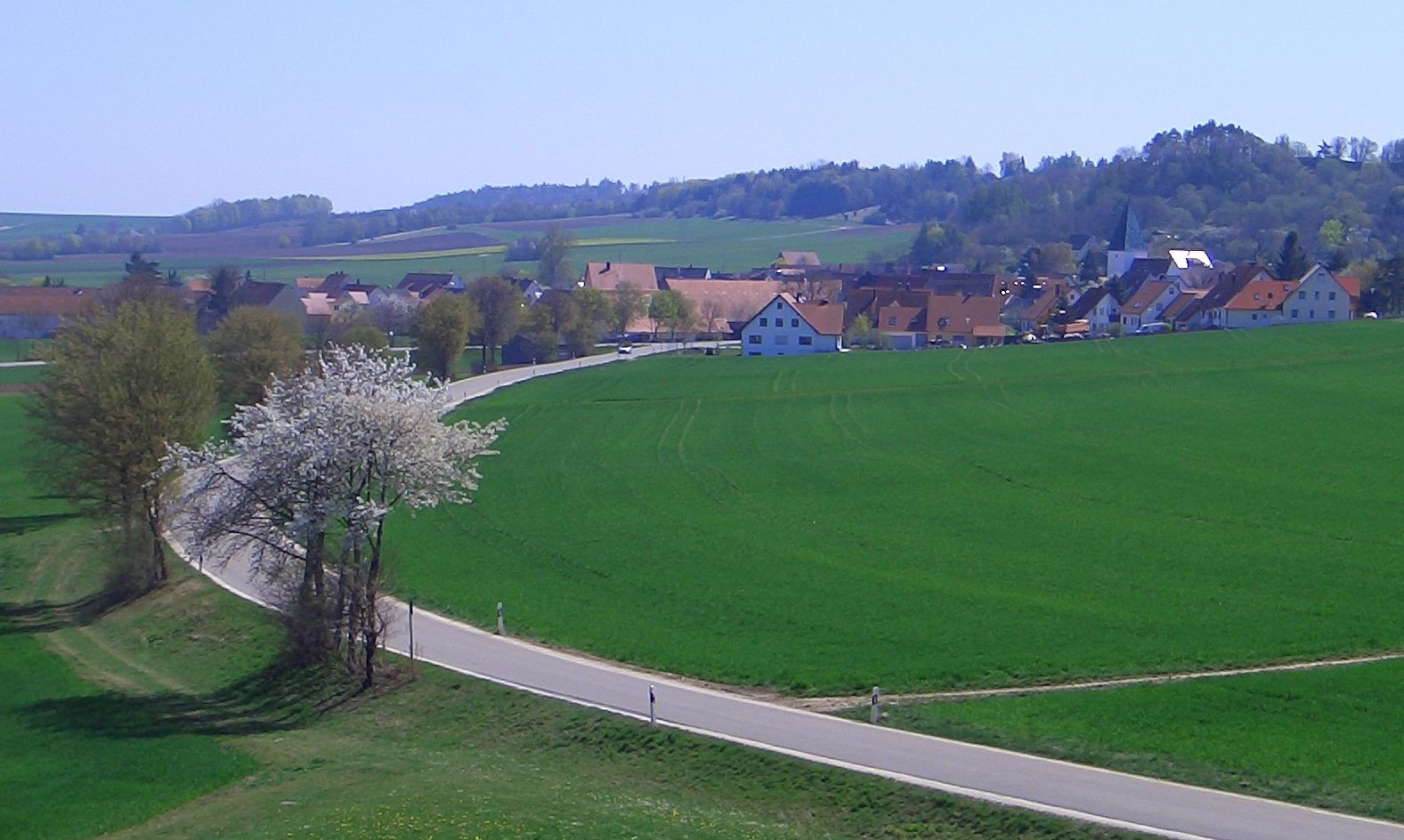 Blick von Westen auf Holheim, Nördlingen, Landkreis Donau-Ries, Deutschland